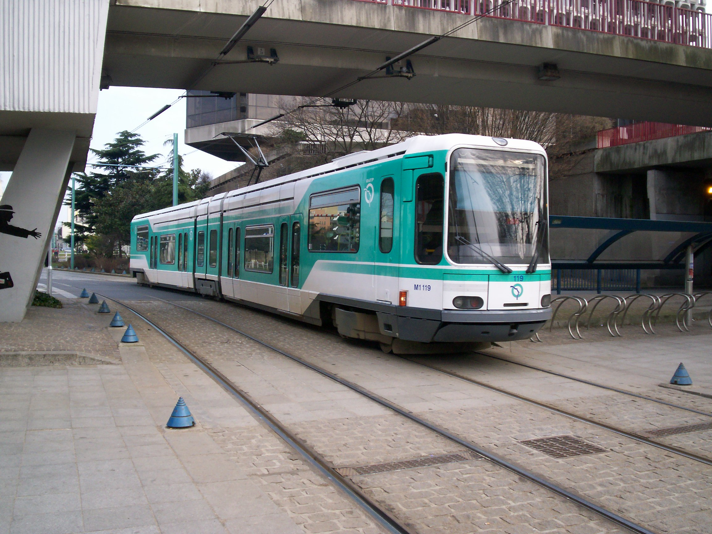 T1 s'éloignant de Hôtel de Ville de Bobigny